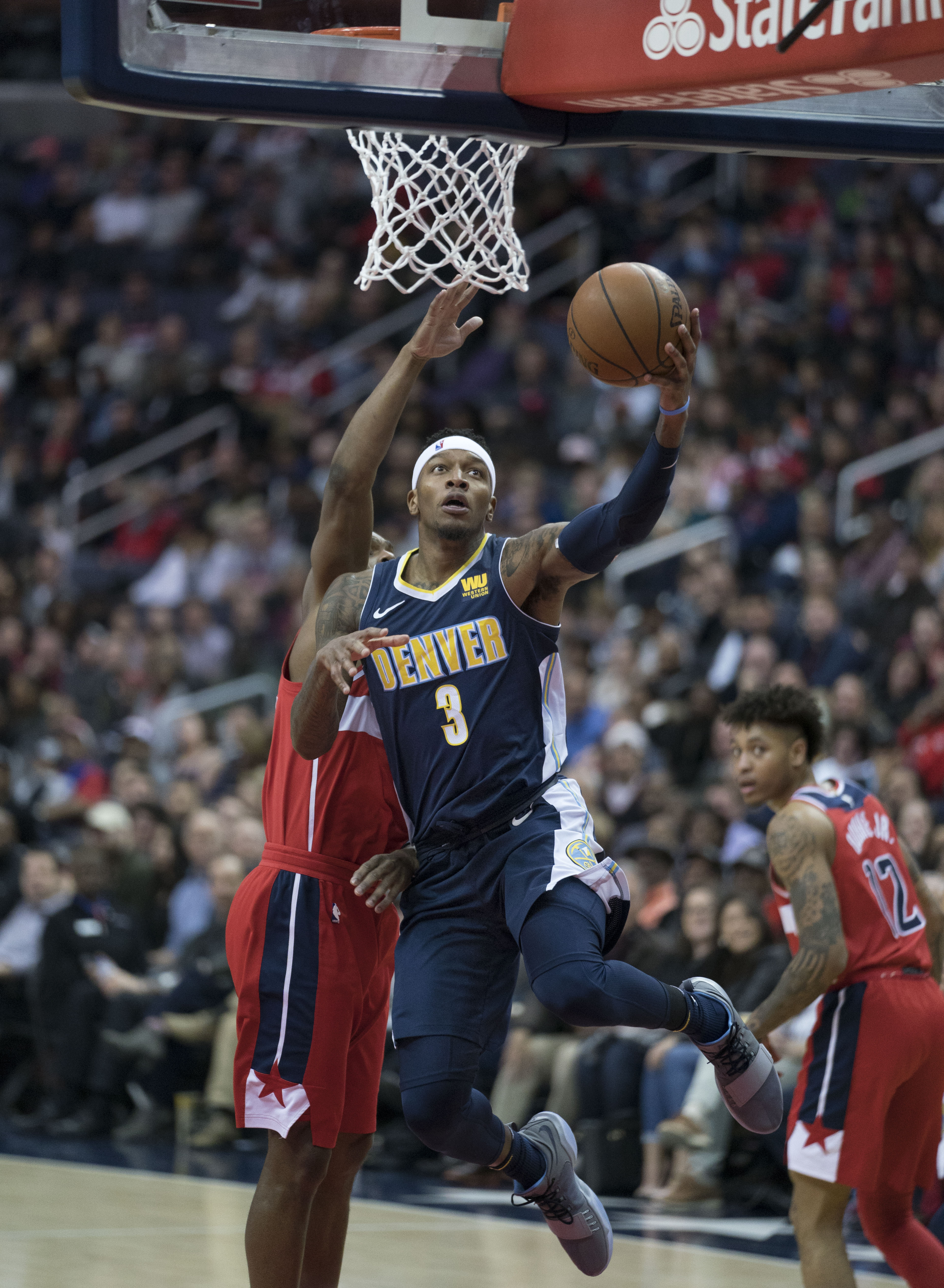 Nuggets at Wizards 3/23/18